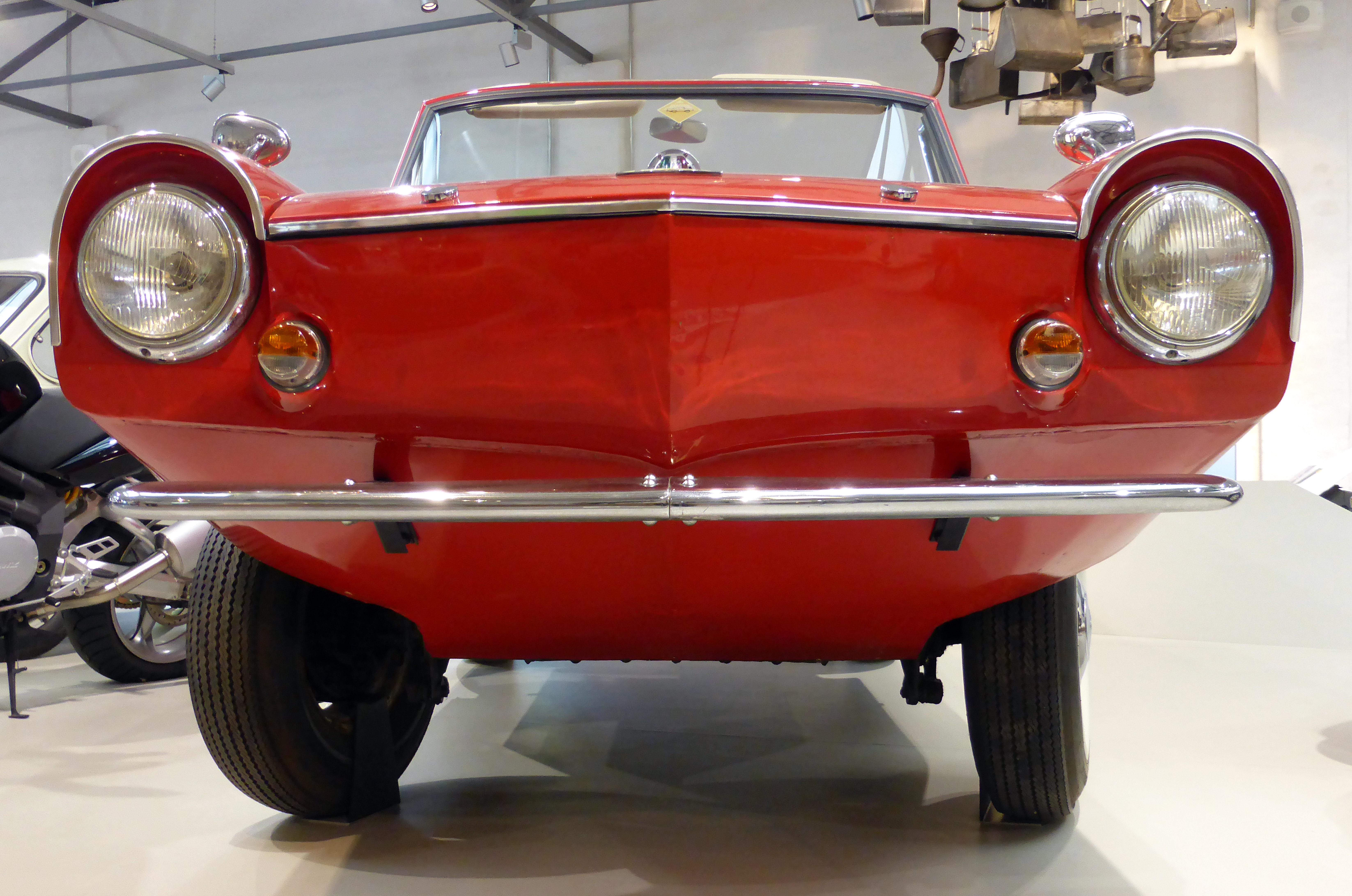 Amphicar im Deutschen Technikmuseum in Berlin. Wikipedianische KulTour am 10. Oktober 2015 in der Ausstellung des Museums.